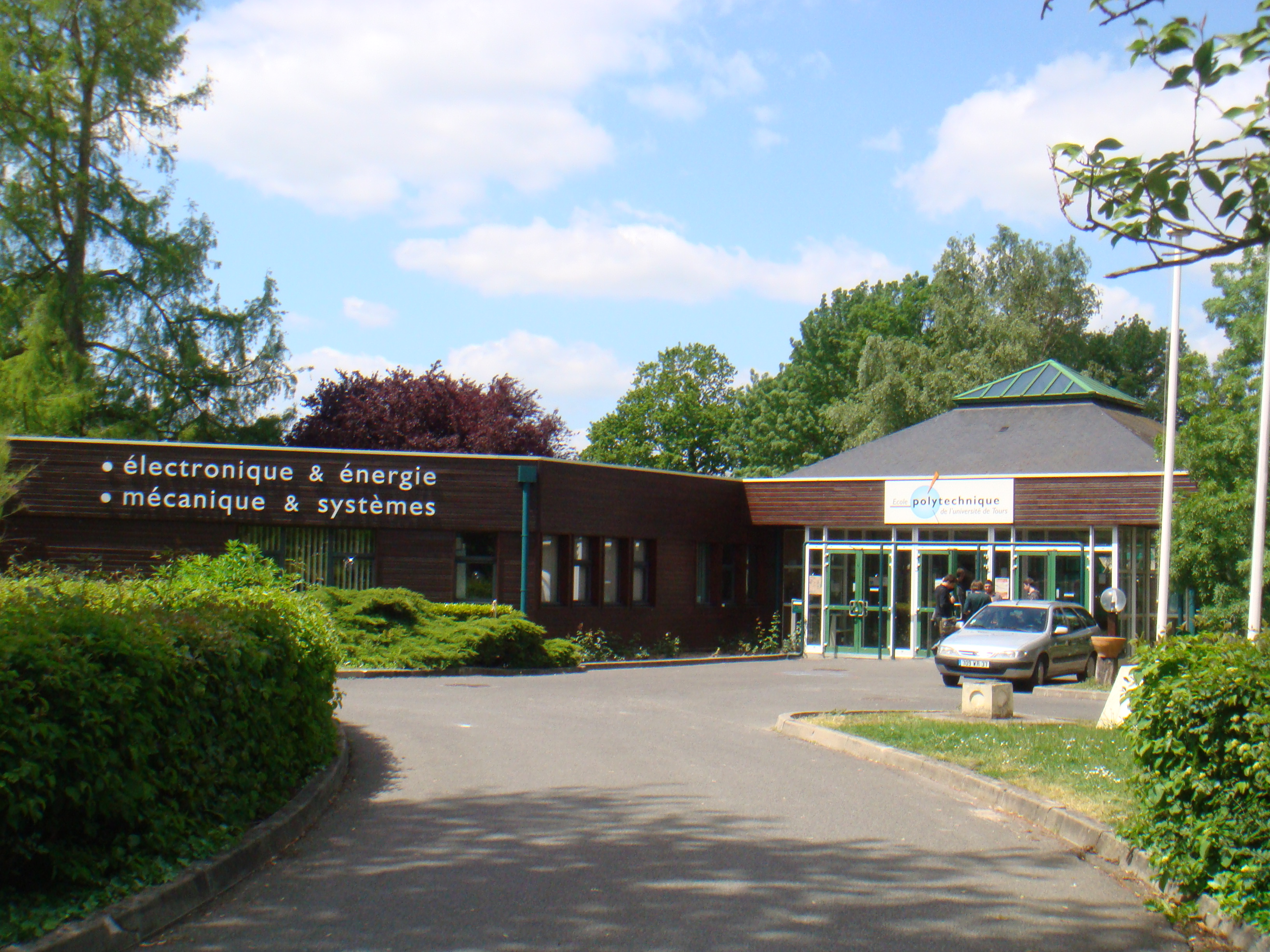 Polytech Départements Electronique et Energie et Mécanique et Systèmes